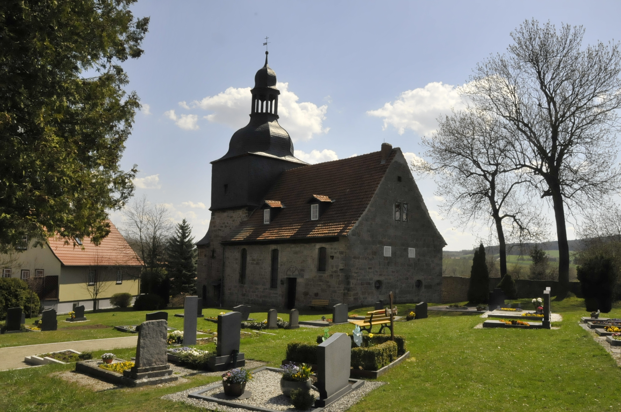 Kirche in Griesheim, Ilmtal